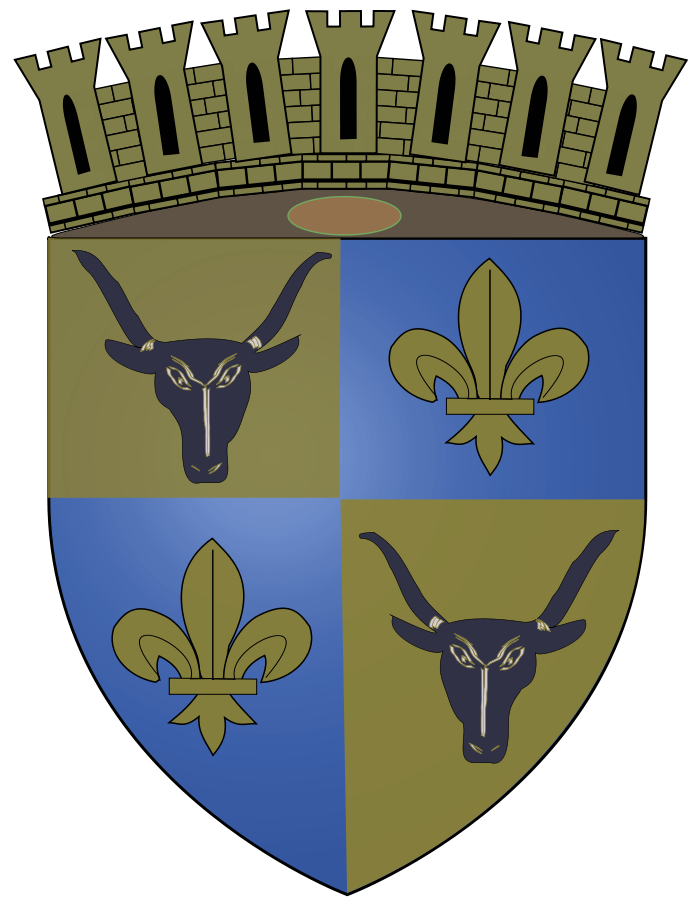 Blason d'Antananarivo